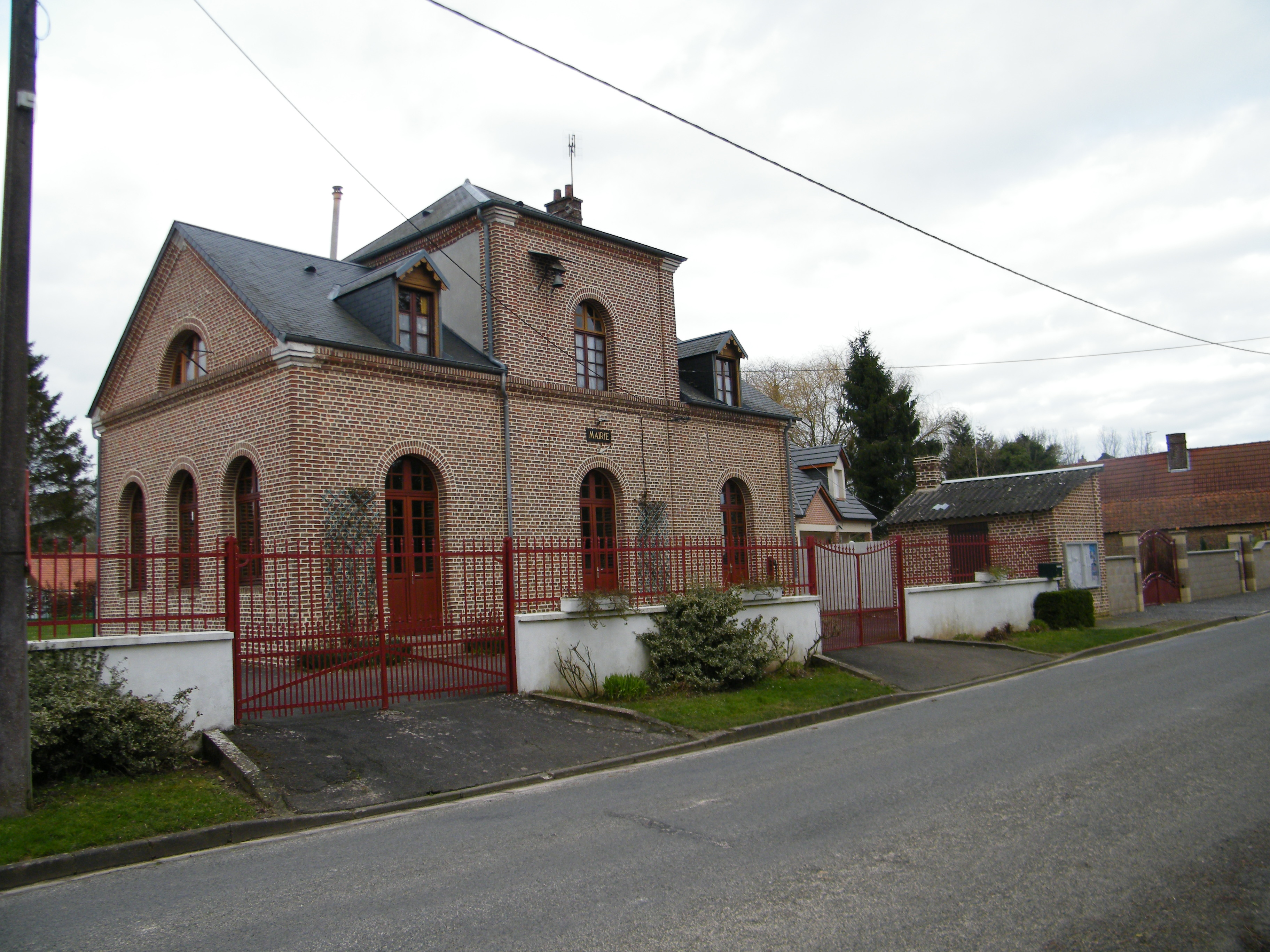 mairie, ancienne école.